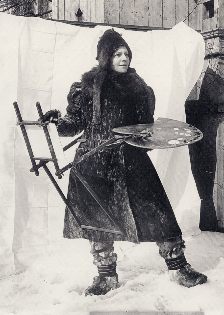 Anna Boberg med sin mobila målarutrustning